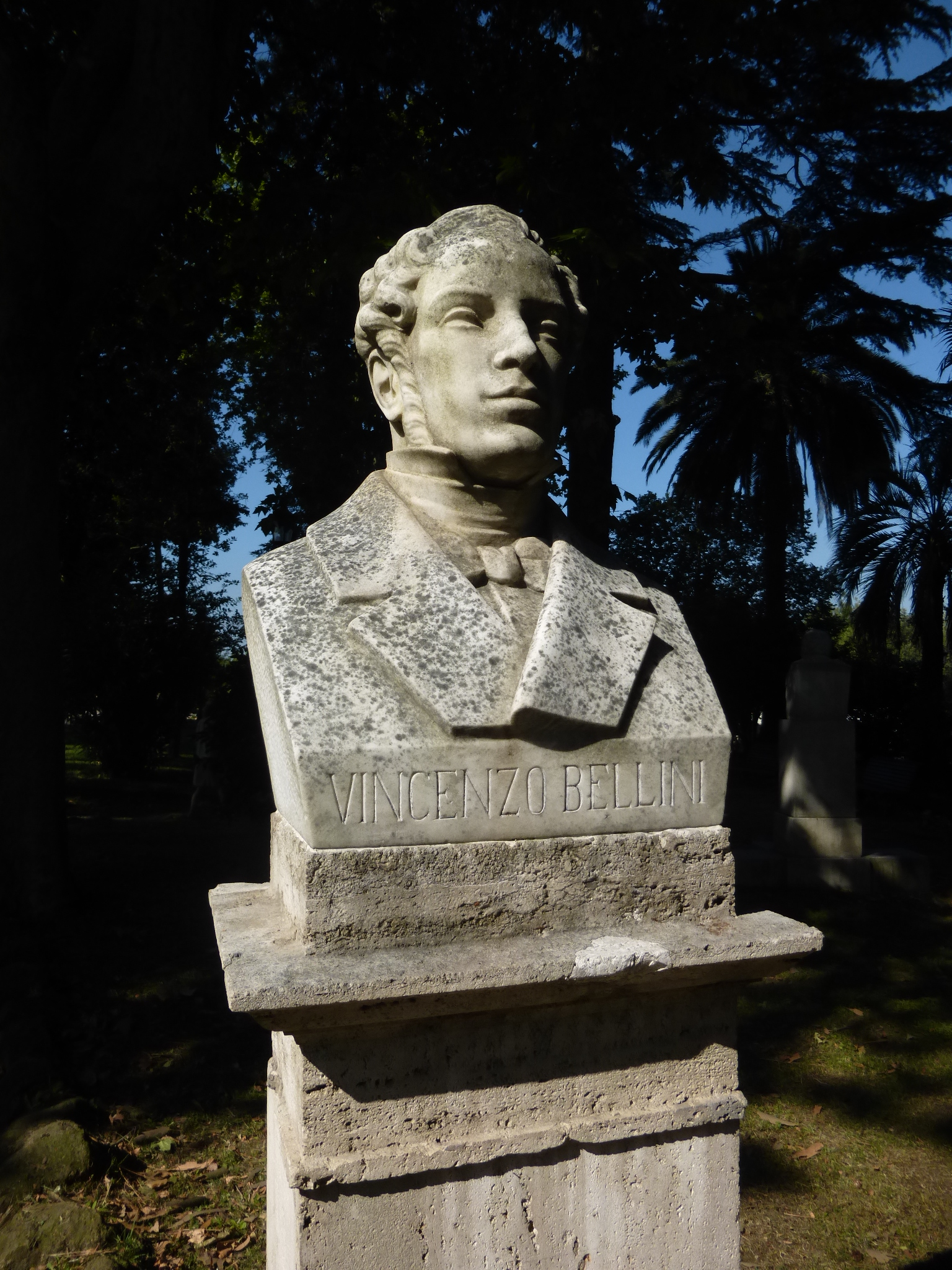 Roma, Pincio. Busto di Vincenzo Bellini